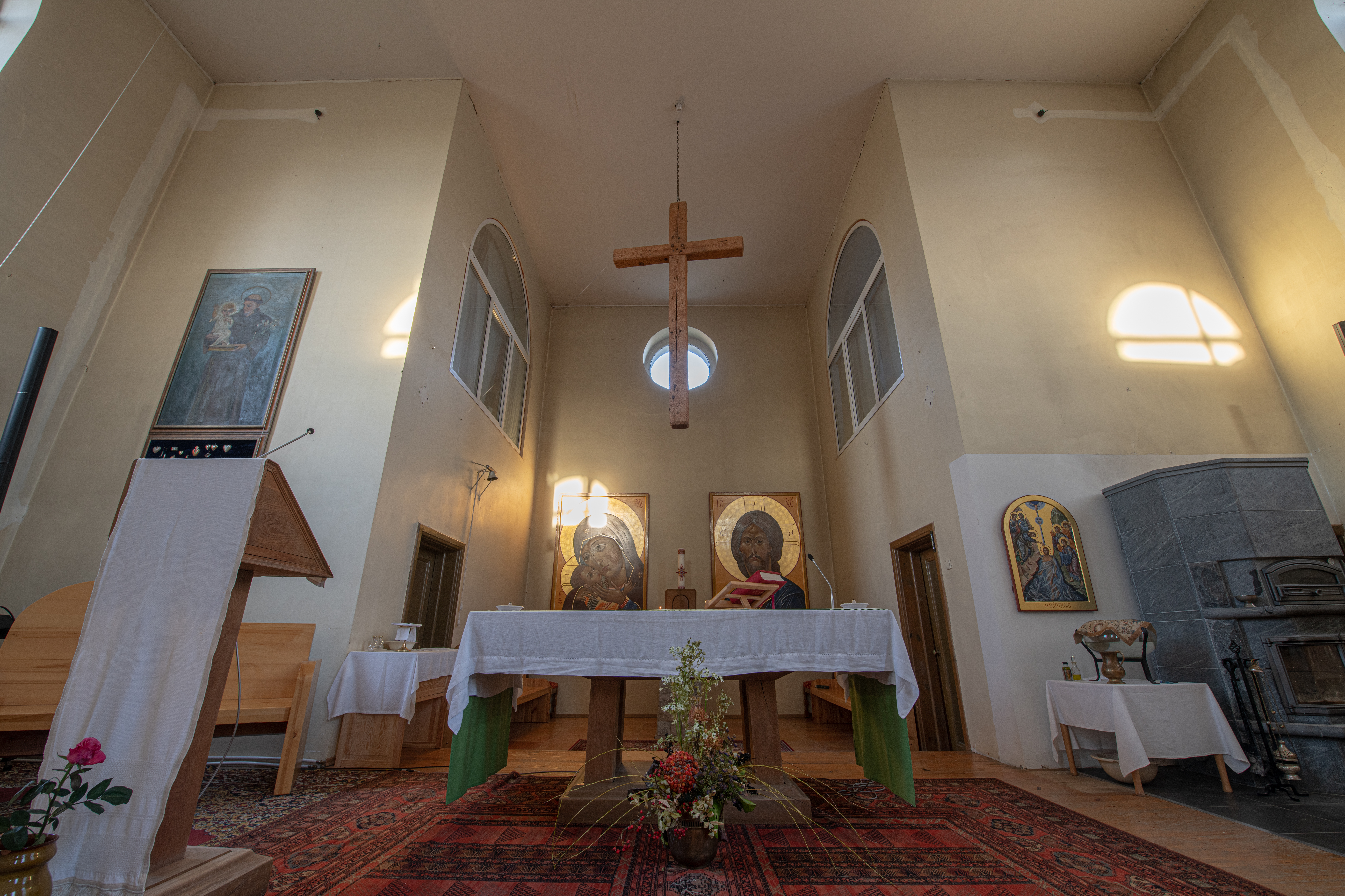 Pakutuvėnų Šv. Antano Paduviečio bažnyčios vidus